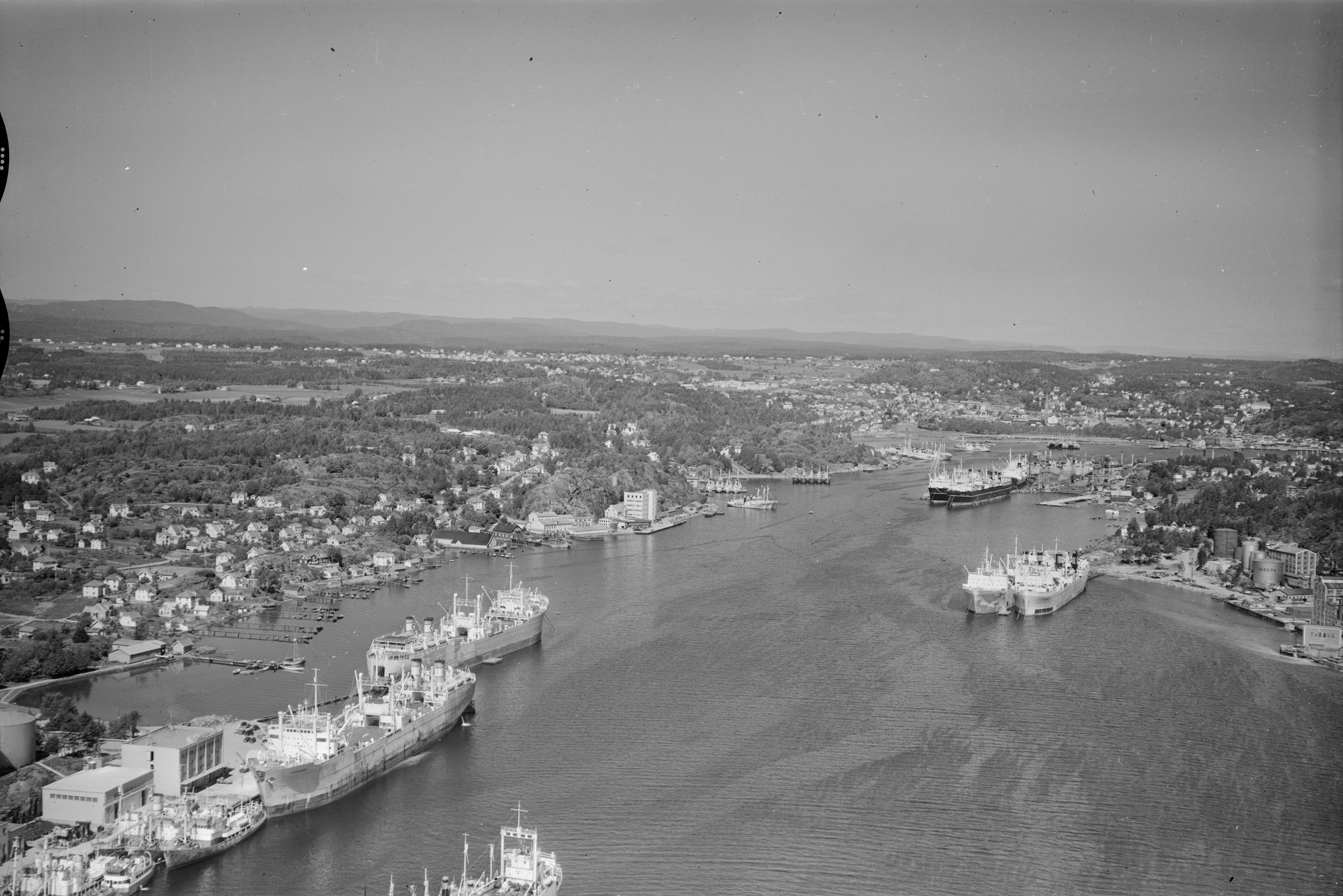 Widerøe skråfoto fra Sandefjord kommune. Til venstre hvalkokeriene Thorshøvdi (foran) og Thorshavet, til høyre Kosmos III og Kosmos IV, i bakgrunnen Norhval og Abraham Larsen. I forgrunnen ses formasten til DT Janina (eks. Anglo Norse)